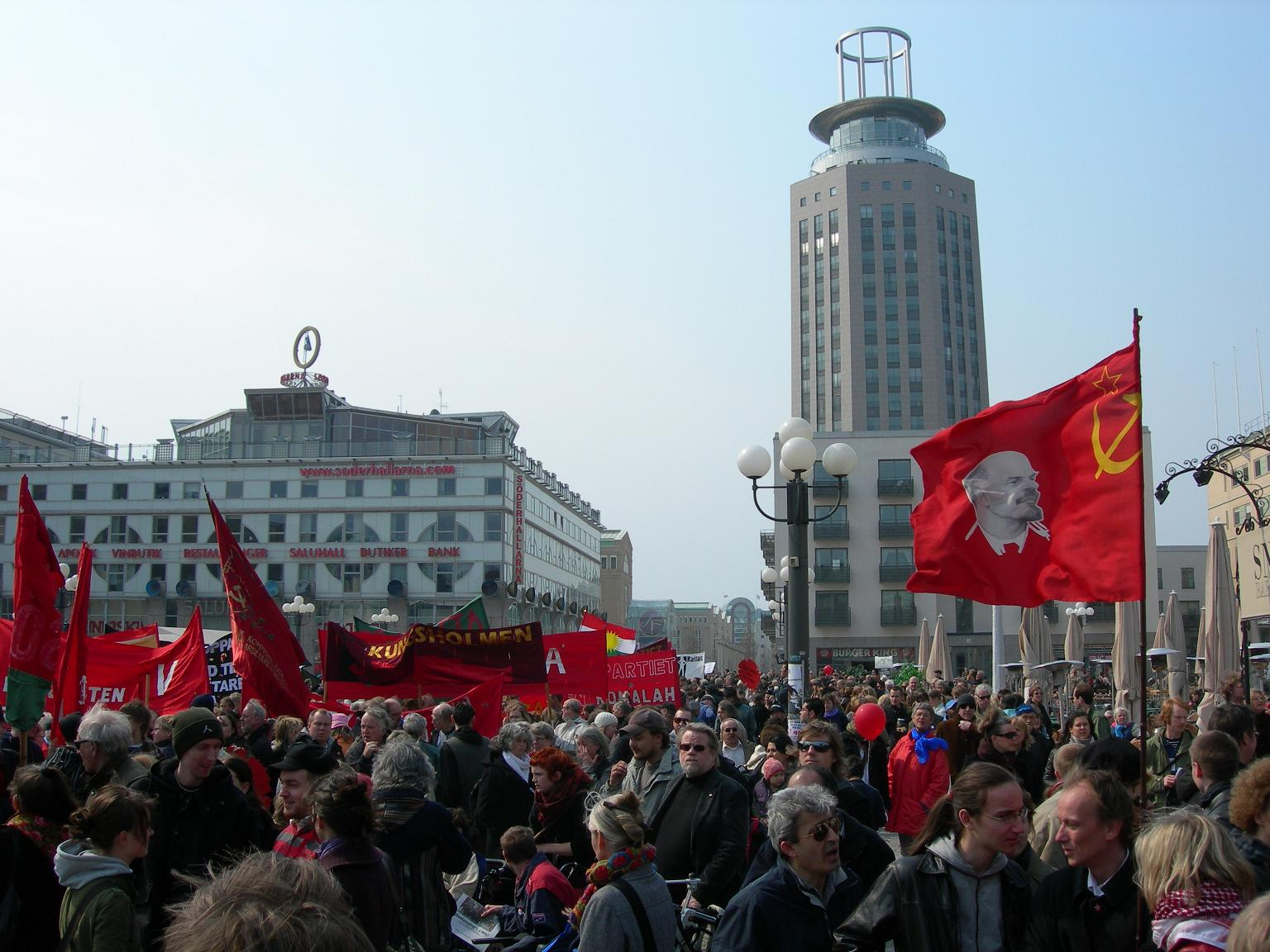 Communist May Day demonstration at Medborgarplatsen, Stockholm, Sweden. 2006.